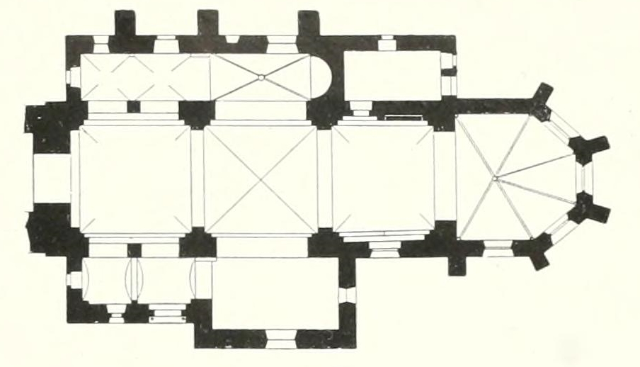 St. Vinzentius (Bochum), Grundriss vor 1905